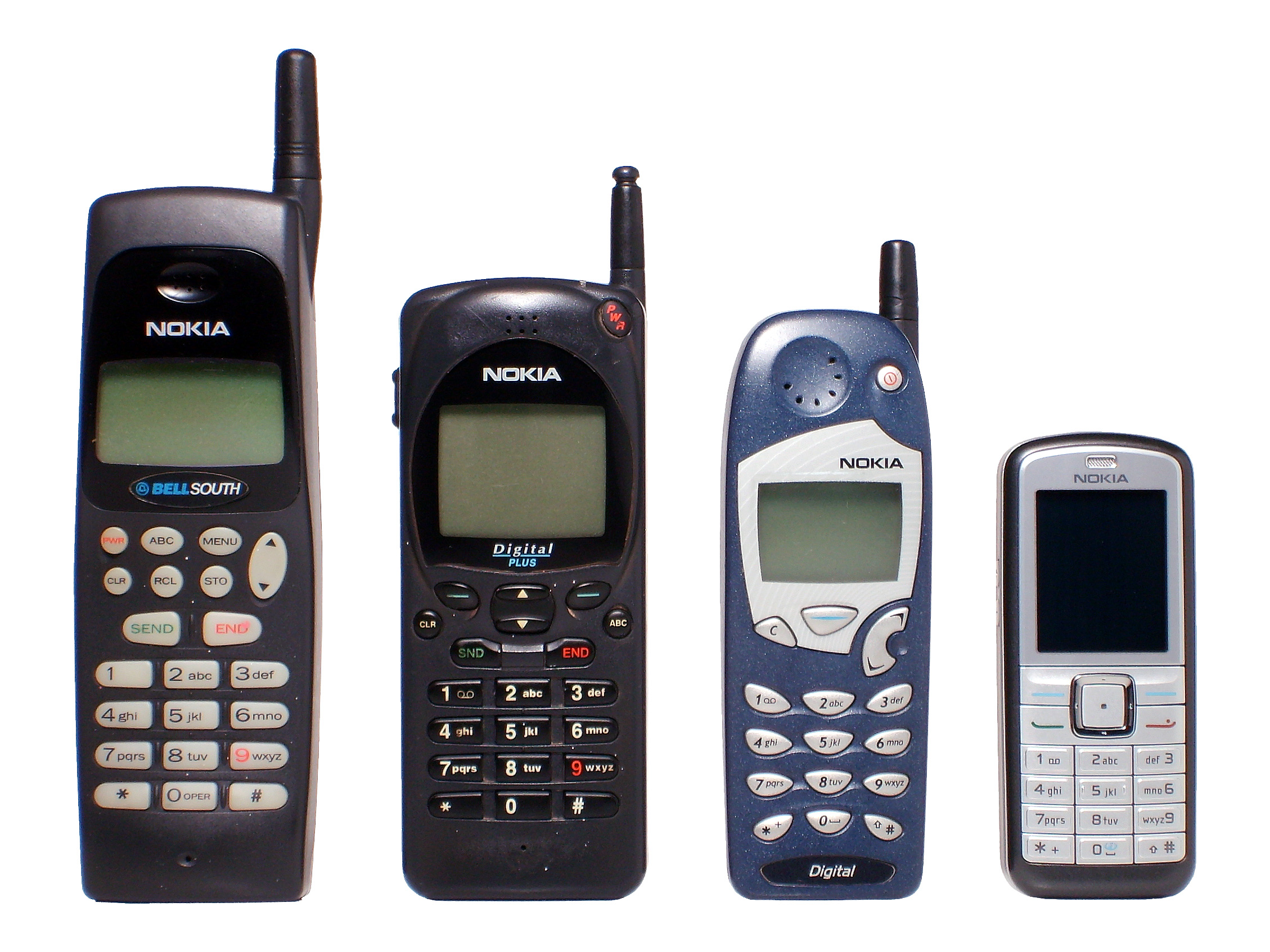 Evolución de tamaño de los teléfonos móviles Nokia, de izquierda a derecha: Nokia 638 (19,06cm de alto), Nokia 2160 EFR (16,42 cm), Nokia 5160 (14,84 cm), Nokia 6070 (10,5 cm)